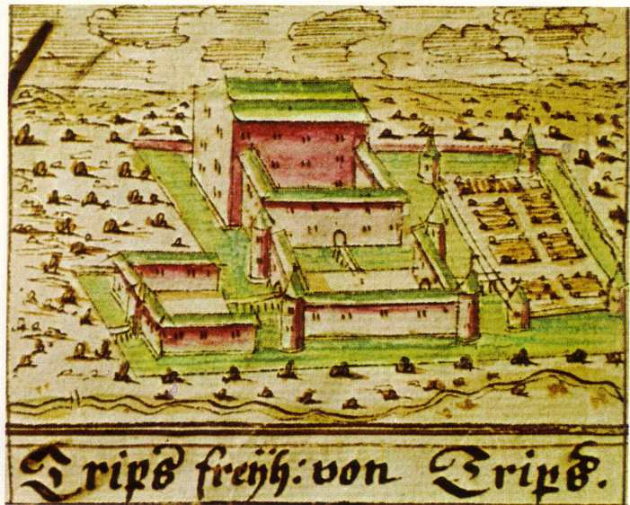 Burg Trips, Geilenkirchen im Codex Welser